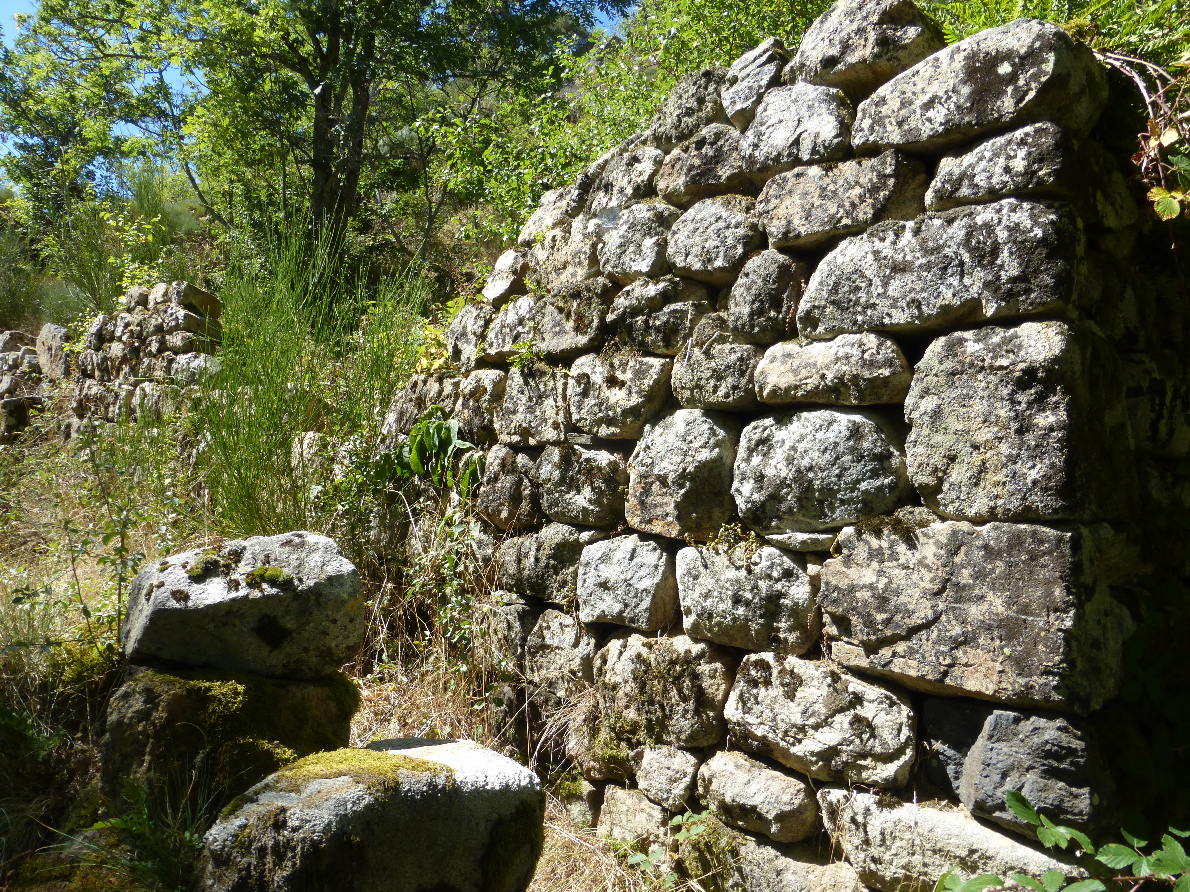 Ruines du Château féodal de Chambarlhac, cité pour la première fois en 1014, et qui donna son nom à la Seigneurie de Chambarlhac et à la famille noble qui porta ce nom. Commune de Chanéac, Ardèche, France. Août 2017